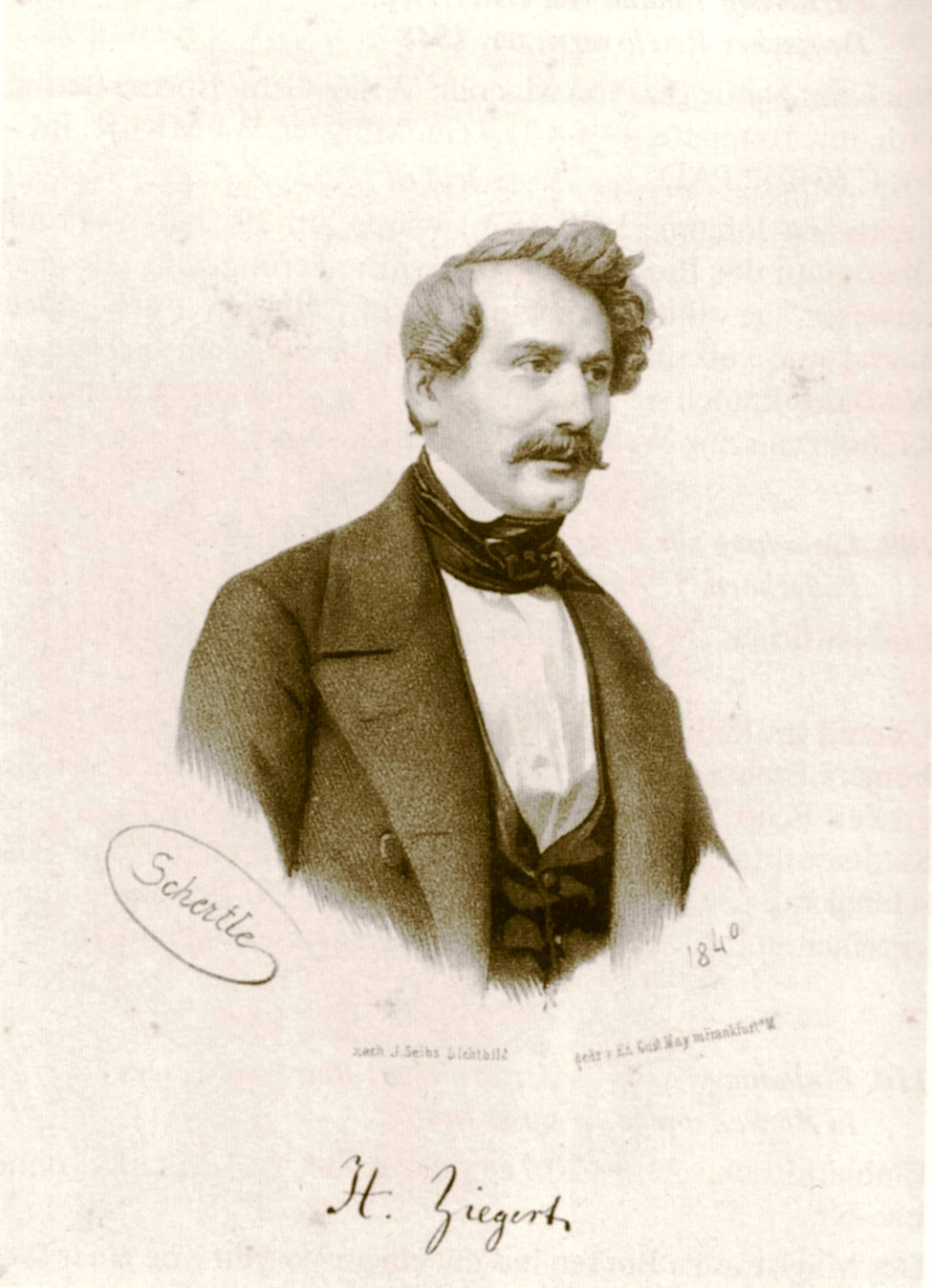 August Ziegert (Lithographie um 1840)